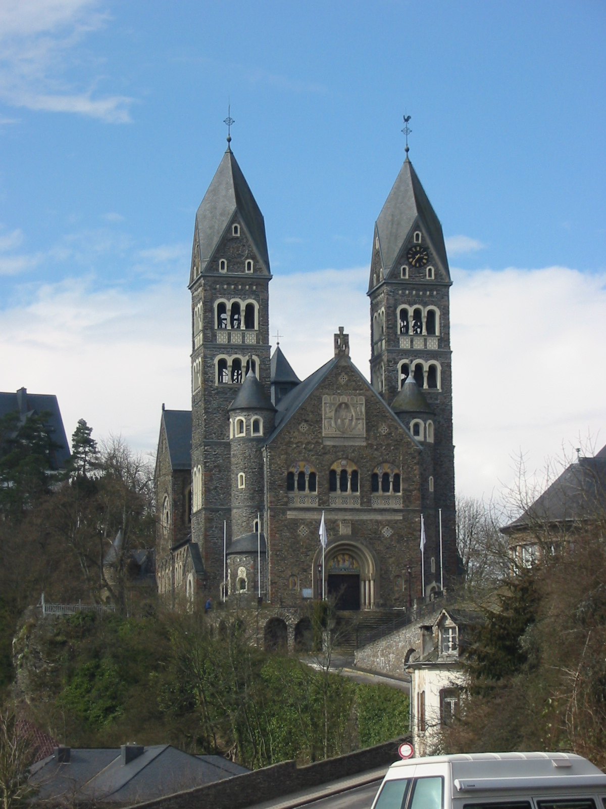 Luxembourg, Clervaux, Church